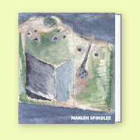 Katalog Marlen Spindler